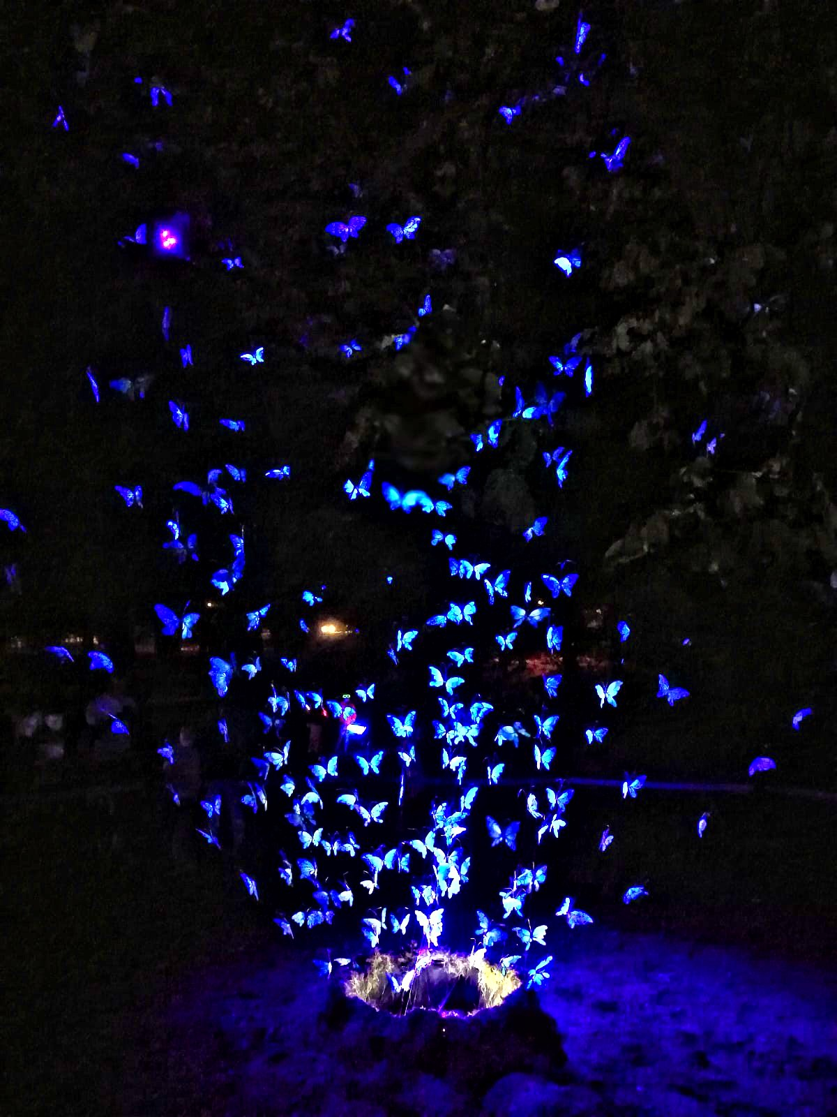 Skyway w Toruniu (Wciąż żywa 2018)